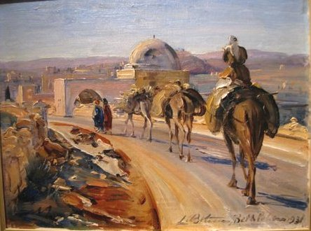 Ludwig Blum , an Israeli painter (1891- 1974) painted portraits such as High Commissioners of Palestine, Abdullah I of Jordan, Moshe Dayan לודוויג בלום (1891 - 1974) היה צייר ישראלי ואחד מאחד ממייסדי "מכבי" בצ'כוסלובקיה. בלום היה צייר אקדמי שצייר תמונות ריאליסטיות בסגנון אירופי דייקני. הרבה לצייר תמונות מנופי ארץ ישראל. הנושאים האהובים עליו היו ירושלים, מדבר יהודה וים המלח. הוא נחשב לצייר מקובל ביותר בתקופת היישוב קבר רחל, 1931